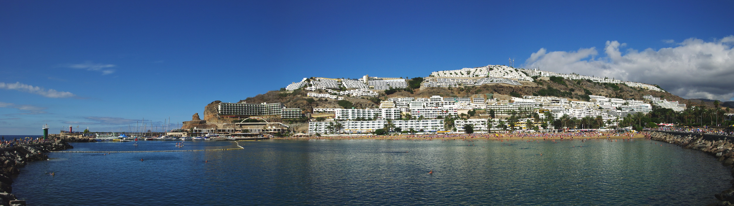 Panoramabild Puertorico Hafen, Gran Canaria